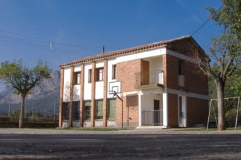 L'escola